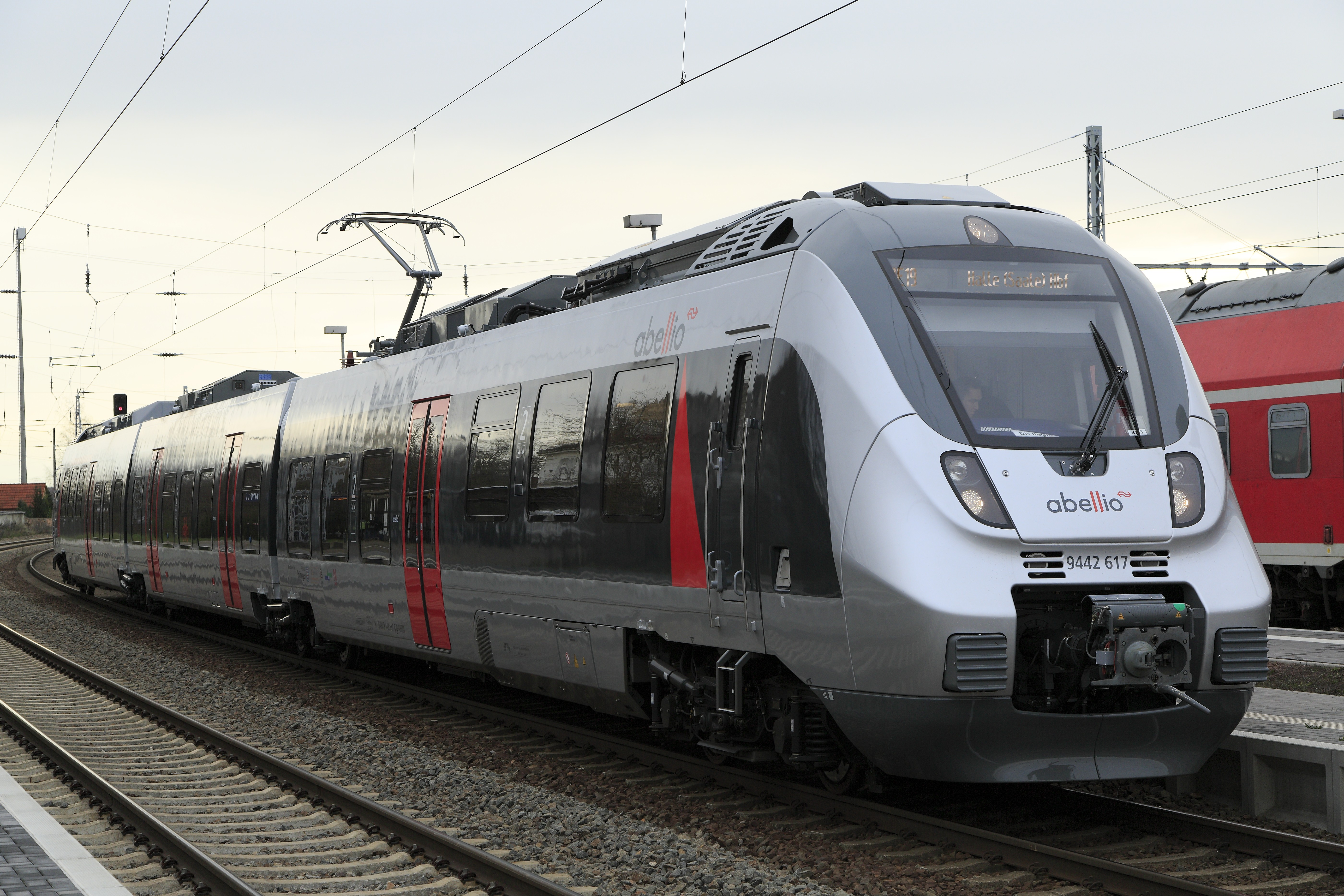 »Abellio«-Triebzug als RE Halle (S) Hbf–Kassel-Wilhelmshöhe beim Wendehalt in Angerdsorf. Die NS-Tochtergesellschaft Abellio übernimmt die Bedienung der Strecke auf eigene Rechnung erst am 13.12.2015, doch besteht beim bisherigen Anbieter DB Regio inzwischen Fahrzeug- und Personalmangel. Bis zum Fahrplanwechsel verkehren deshalb einige Abellio-Umläufe im Auftrag von DB Regio.